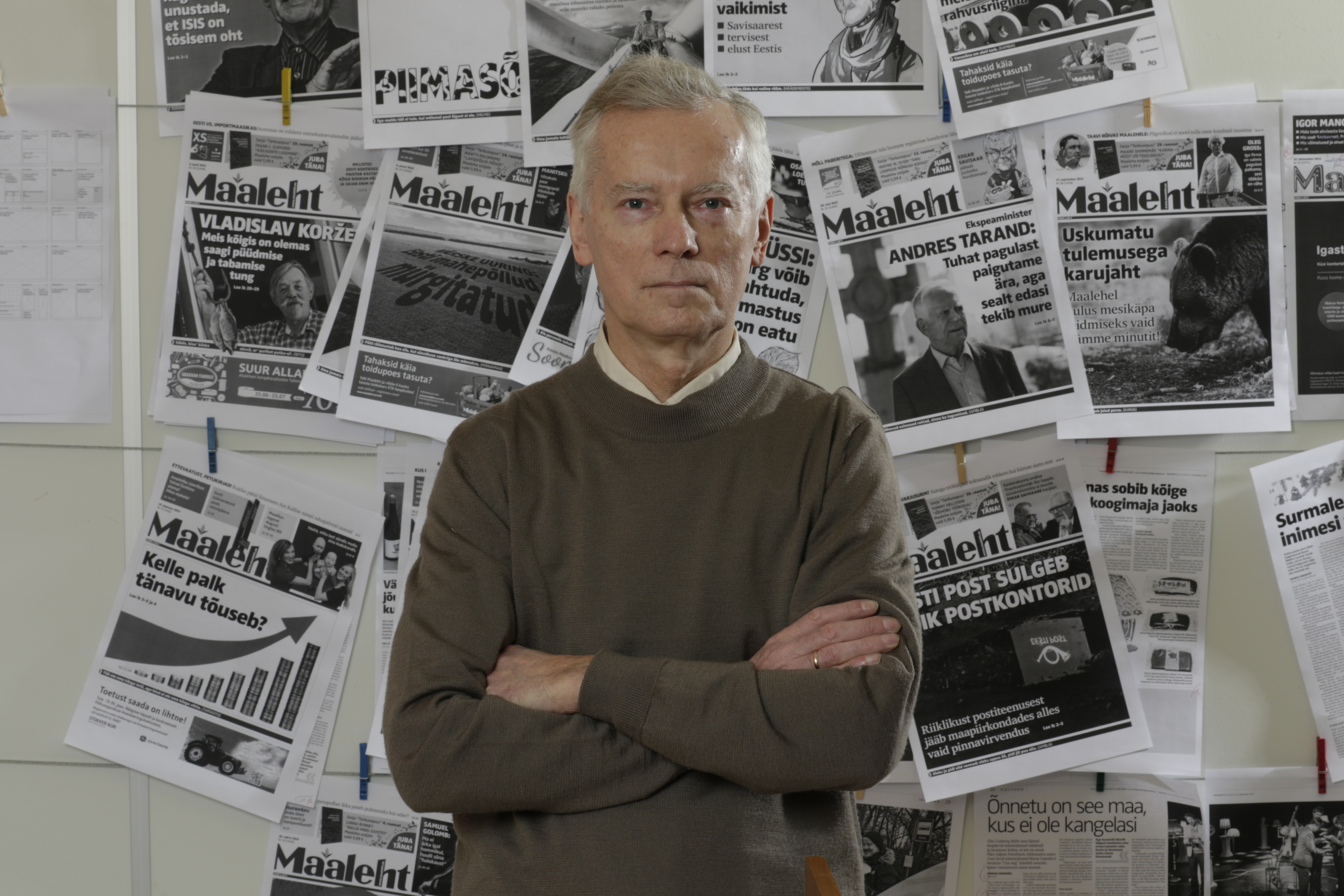 Rein Raudvere